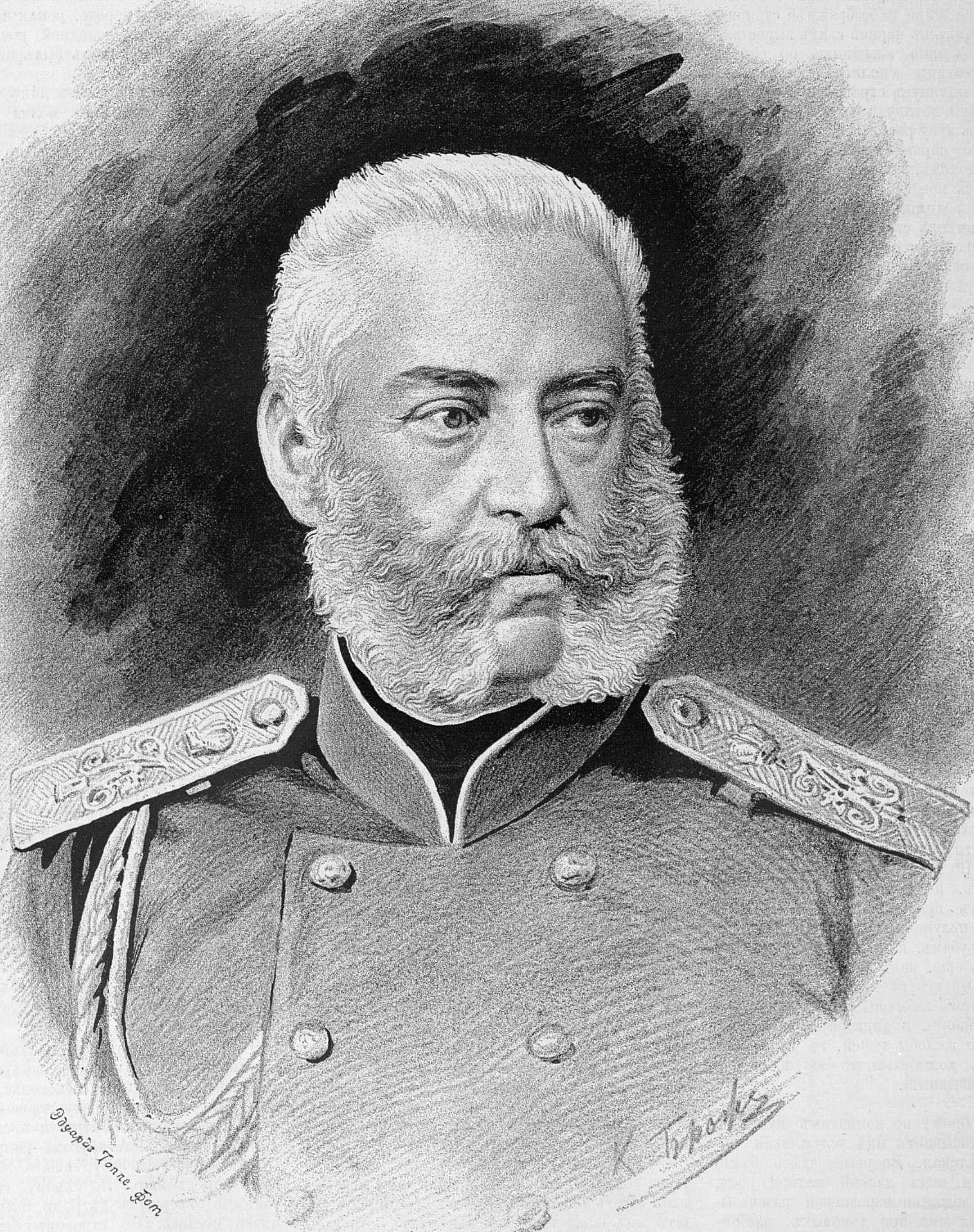 Генерал Адлерберг Александр Владимирович, 1888 год